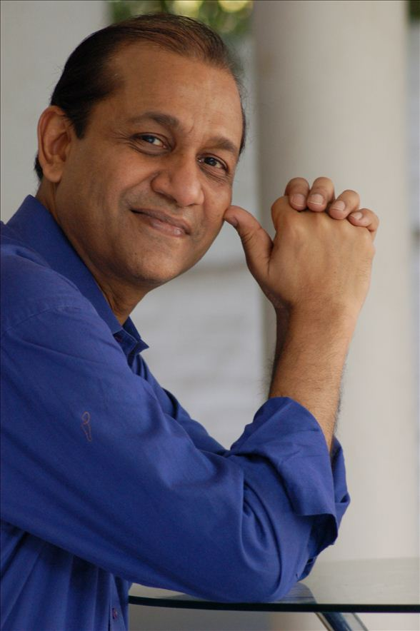 Siddhartha Basu